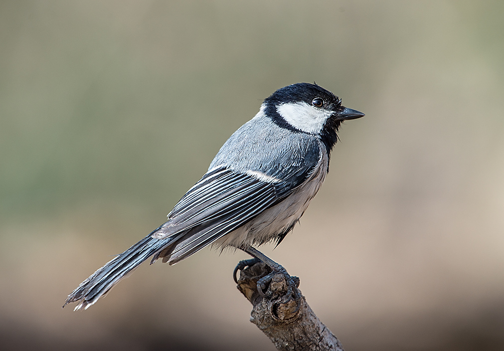 Sattal